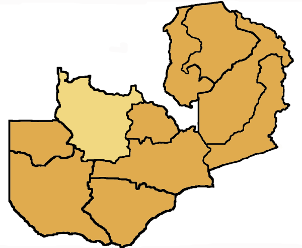 Mappa della diocesi di Solwezi, in Zambia. Lavoro personale, eseguito a partire da questa immagine di Commons. Fonte per i confini: Guida delle missioni cattoliche 2005, a cura della Congregatio pro gentium evangelizatione, Roma, Urbaniana University Press, 2005. Categoria:Chiesa cattolica in Zambia Categoria:Mappe dell'Africa